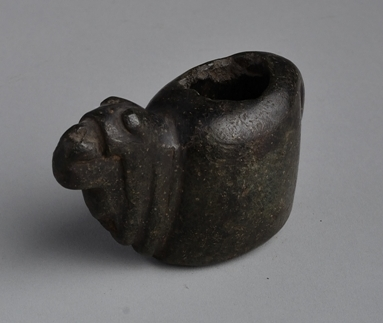 Miniatura o conopa in basalto nero raffigurante un alpaca. Sul reperto si notano tracce di lavorazione con sega a corda e con trapano-sega montato su supporto. Foro sul dorso malamente rifinito o danneggiato successivamente da colpi verticali.